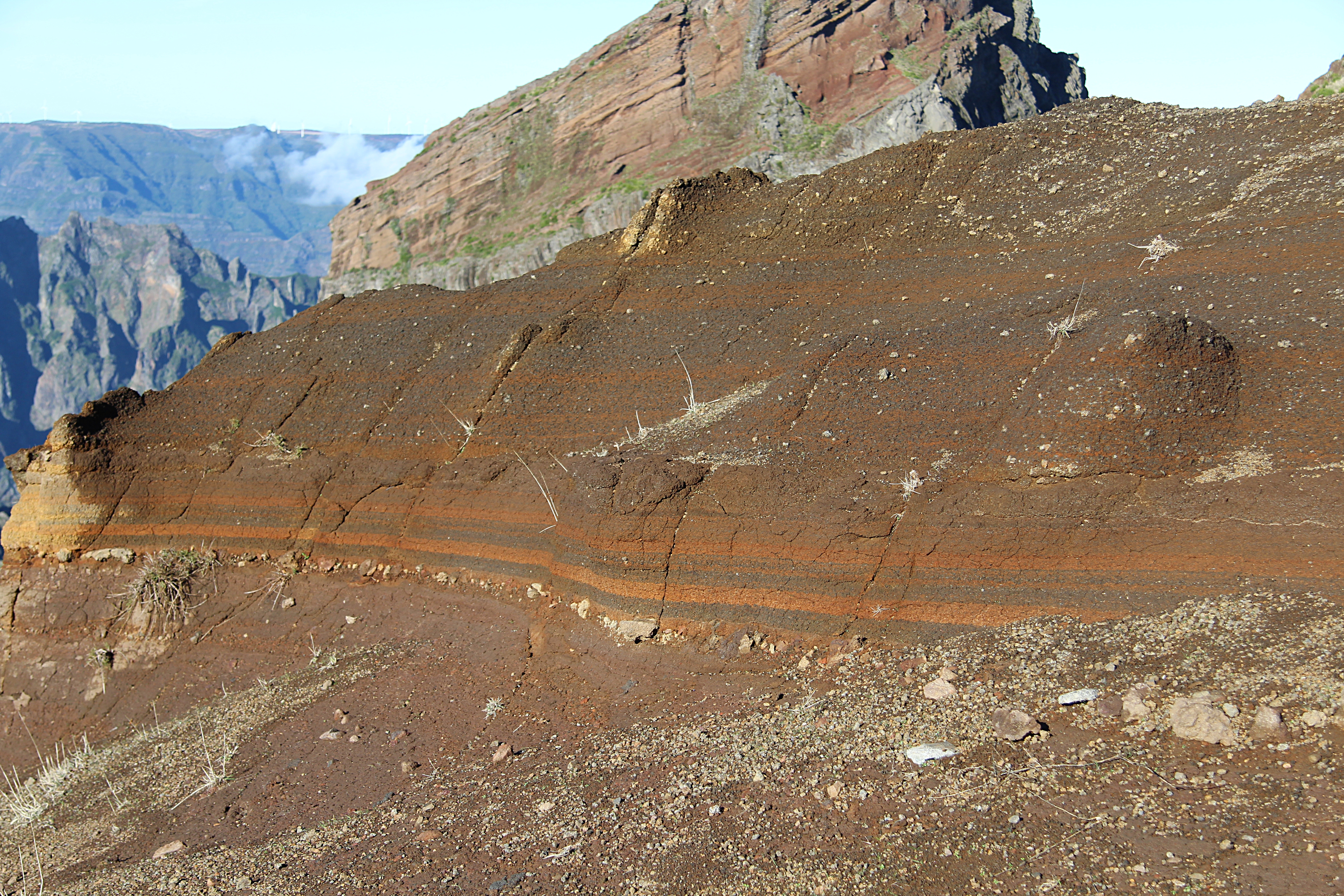 Am Weg zwischen den beiden wichtigsten Gipfeln von Madeira. Aufschluss mit deutlicher Schichtung.